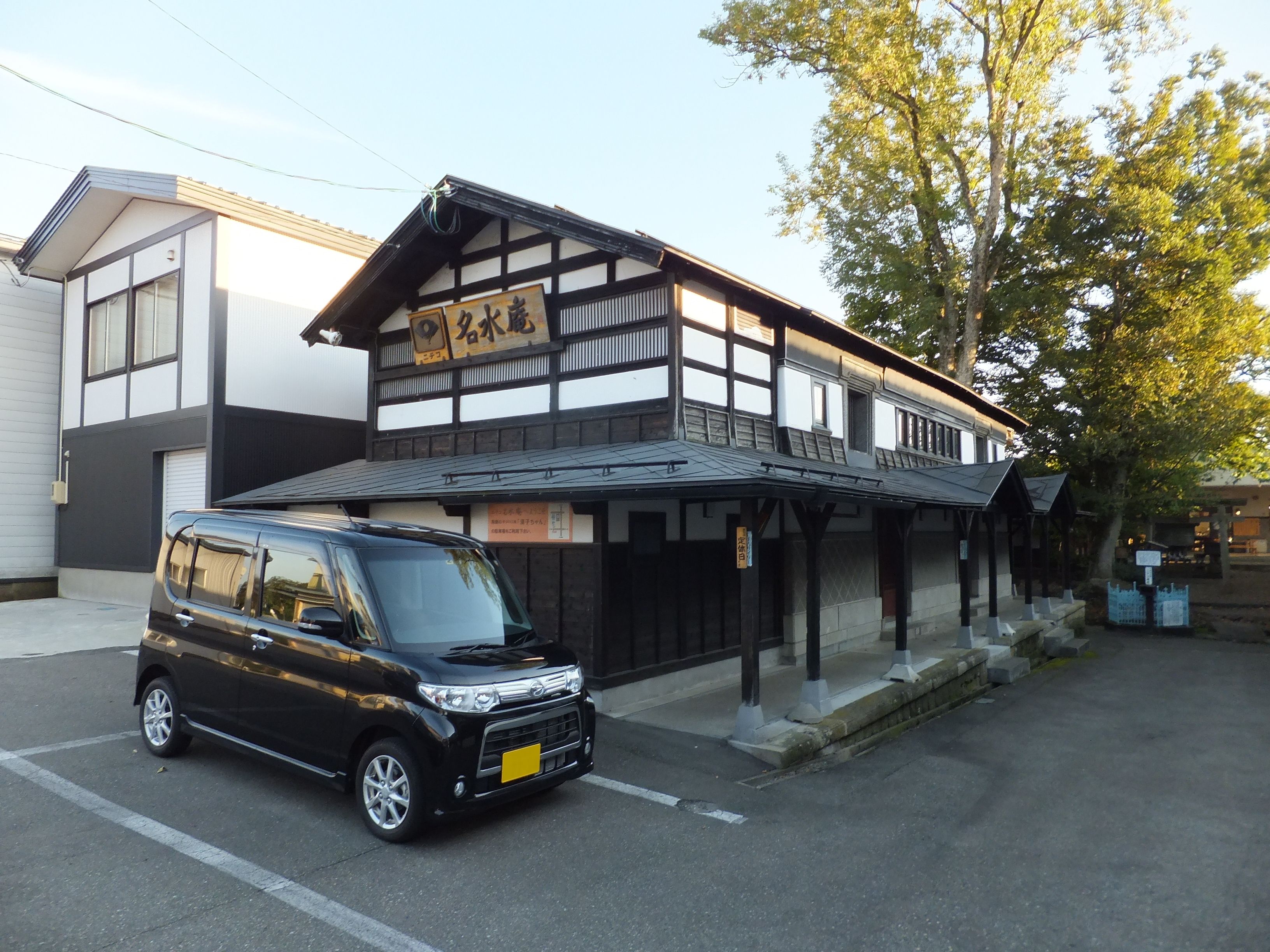 ニテコ名水庵（秋田県美郷町六郷）